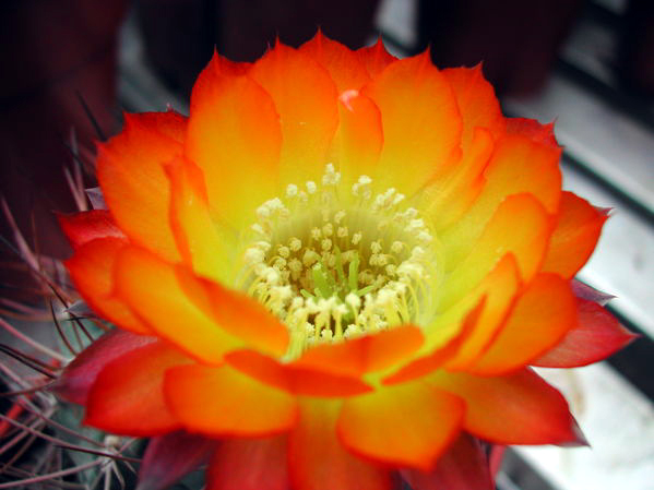 Echinopsis glaucina